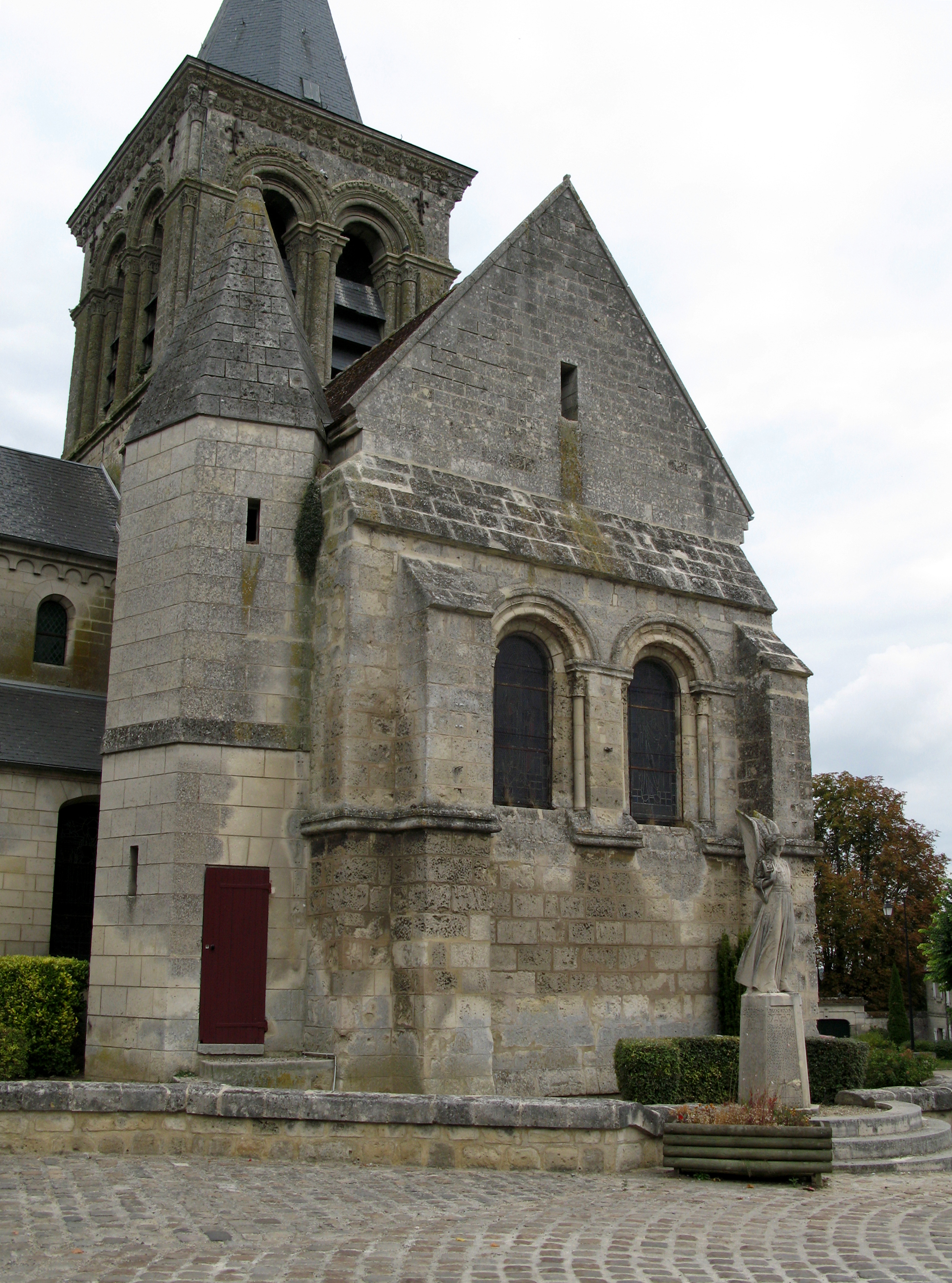 Acy (Aisne, France) - L'église et le monument-aux-morts. . .